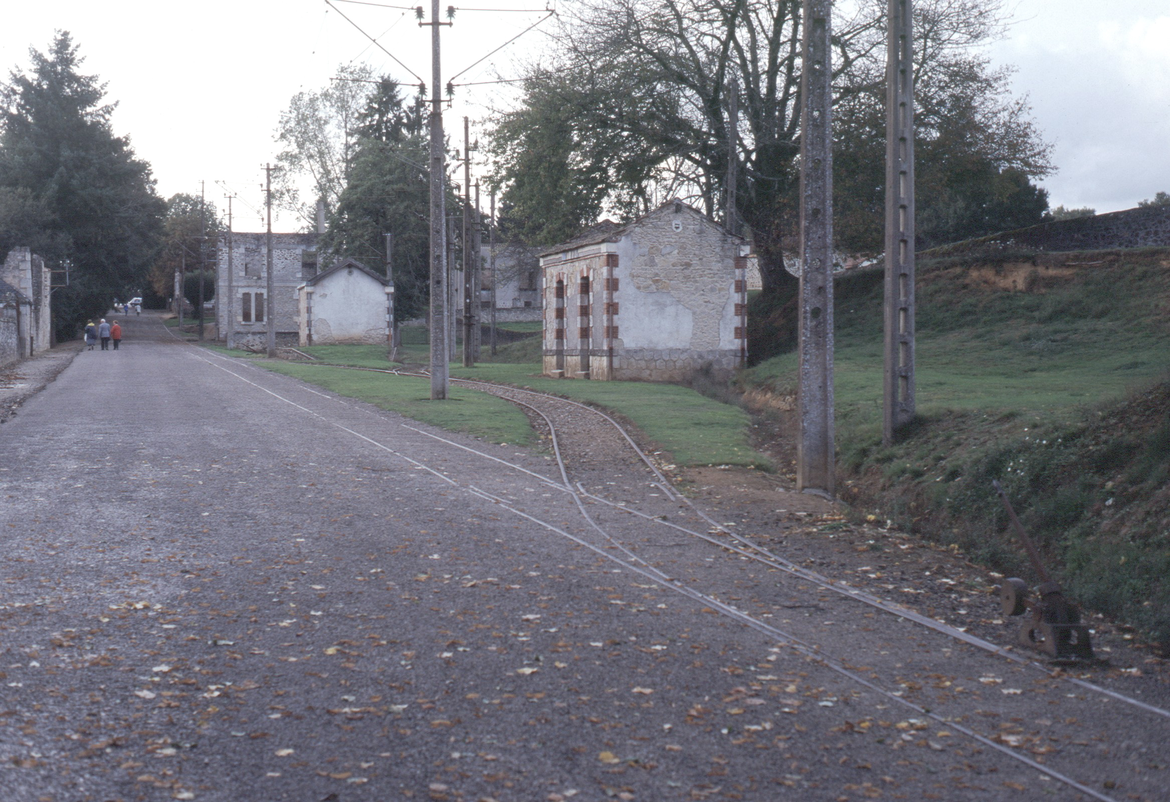 Gare d'Oradour-sur-Glane